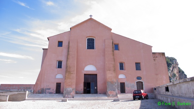 Wikipedia: Capaccio Wikipedia: Heraion alla foce del Sele